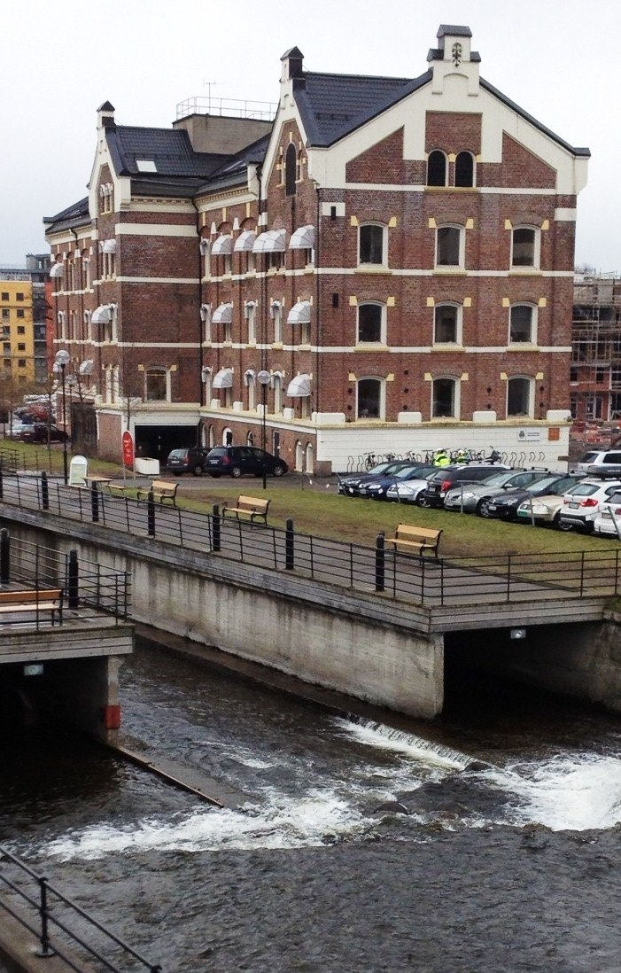 Bakke Mølles bygg ved Akerselva i Nydalen, Oslo. Bildet er tatt fra østsiden av Guldhaug bru. Nydalsveien 21